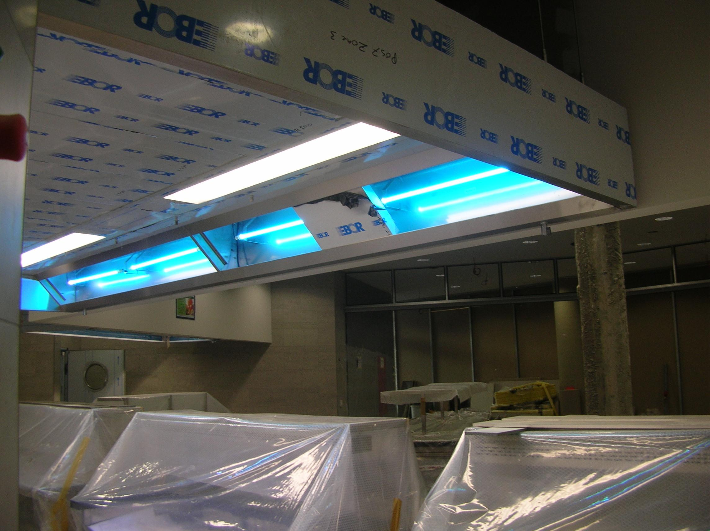 Reven UVC-C Lampen zur Geruchsneutralisation im eingeschalteten Zustand